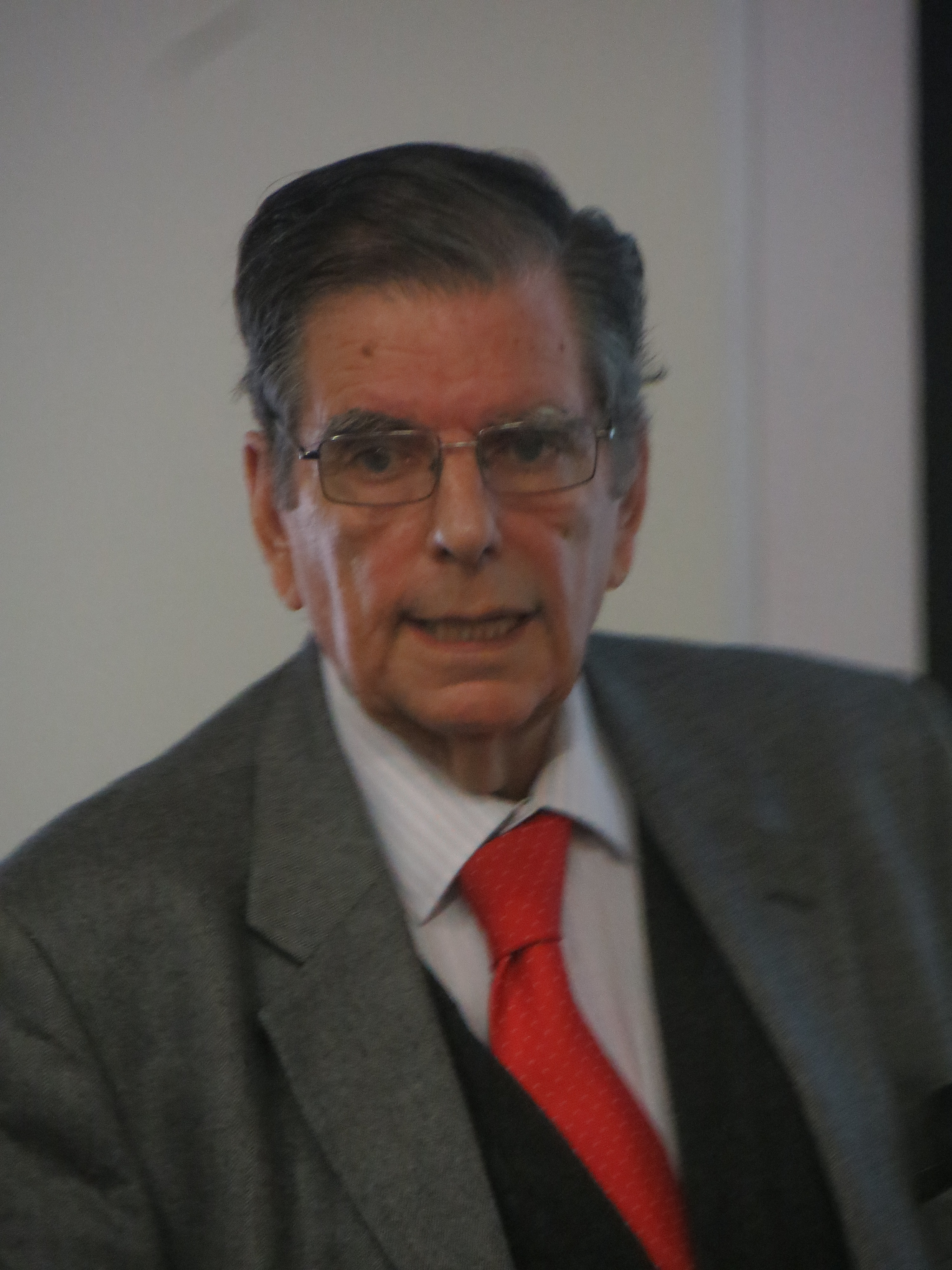 El profesor Osvaldo Silva impartiendo una de sus clases, en la Facultad de Filosofía y Humanidades de la Universidad de Chile.